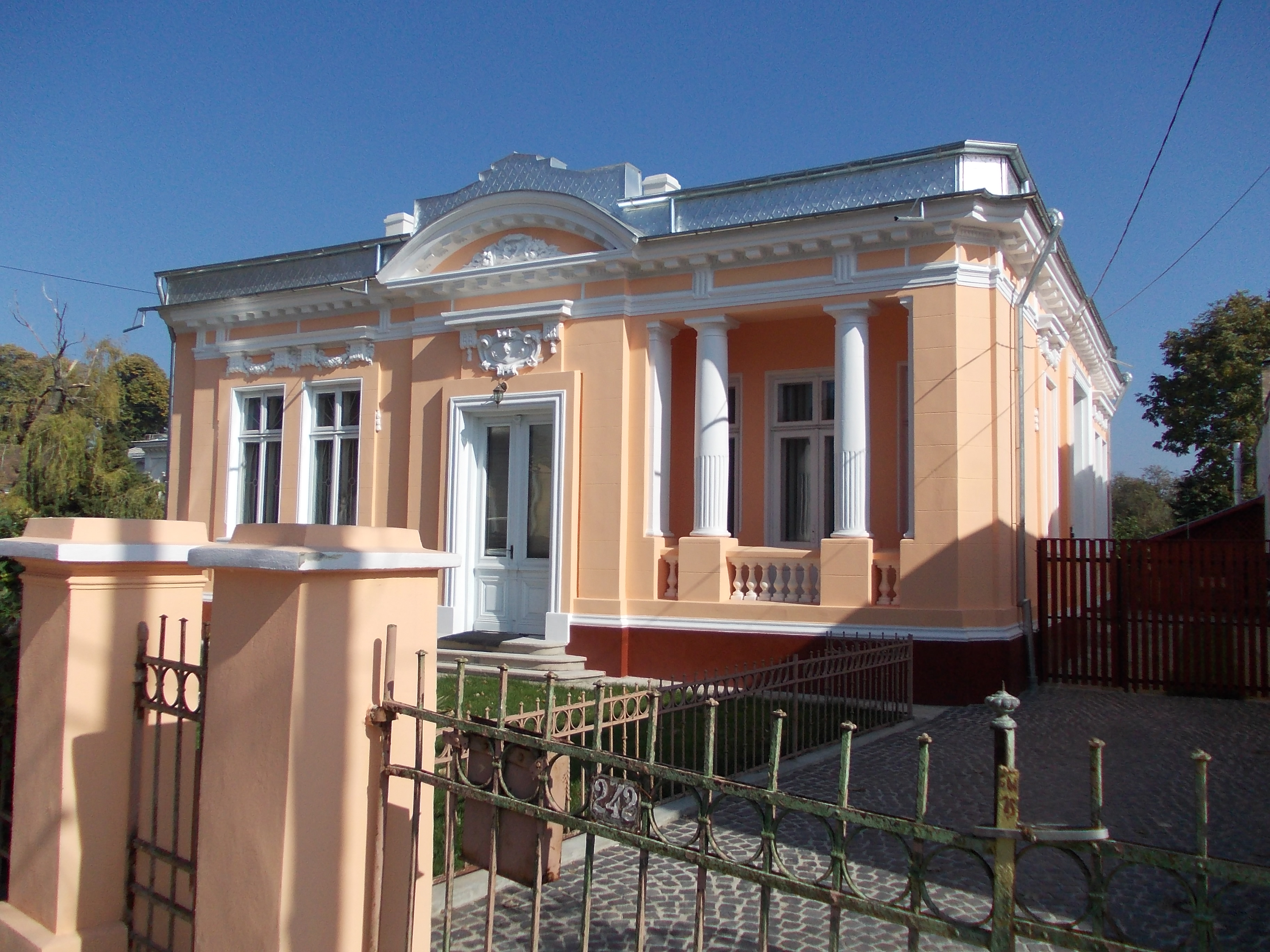 casă pe strada Ştefan cel Mare Roman